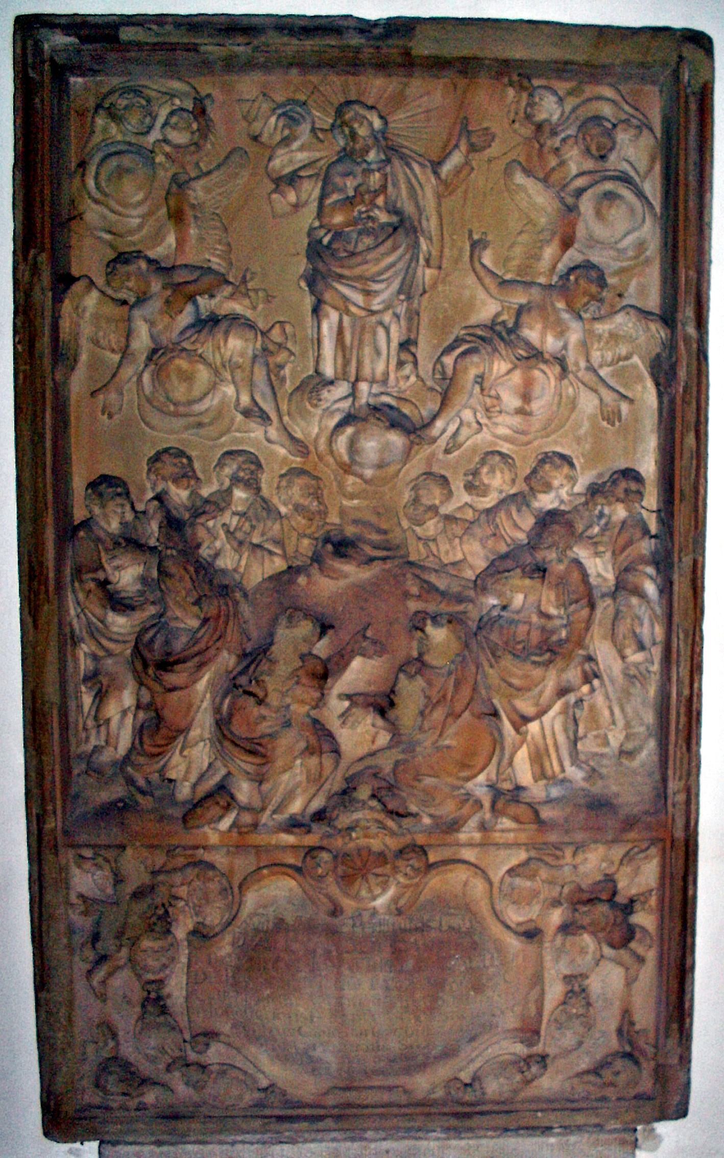 Epitaph des Domscholasters Alexander Johannes Franziskus Ignatius Waldbott von Bassenheim (1667-1715), Speyerer Dom